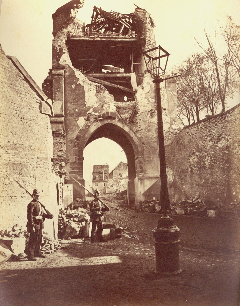 Georg Maria Eckert, Strasbourg, bombardement de 1870, Porte Nationale, photographie [légèrement recadrée et retouchée] sur papier albuminé, Musée d'art moderne et contemporain de Strasbourg.